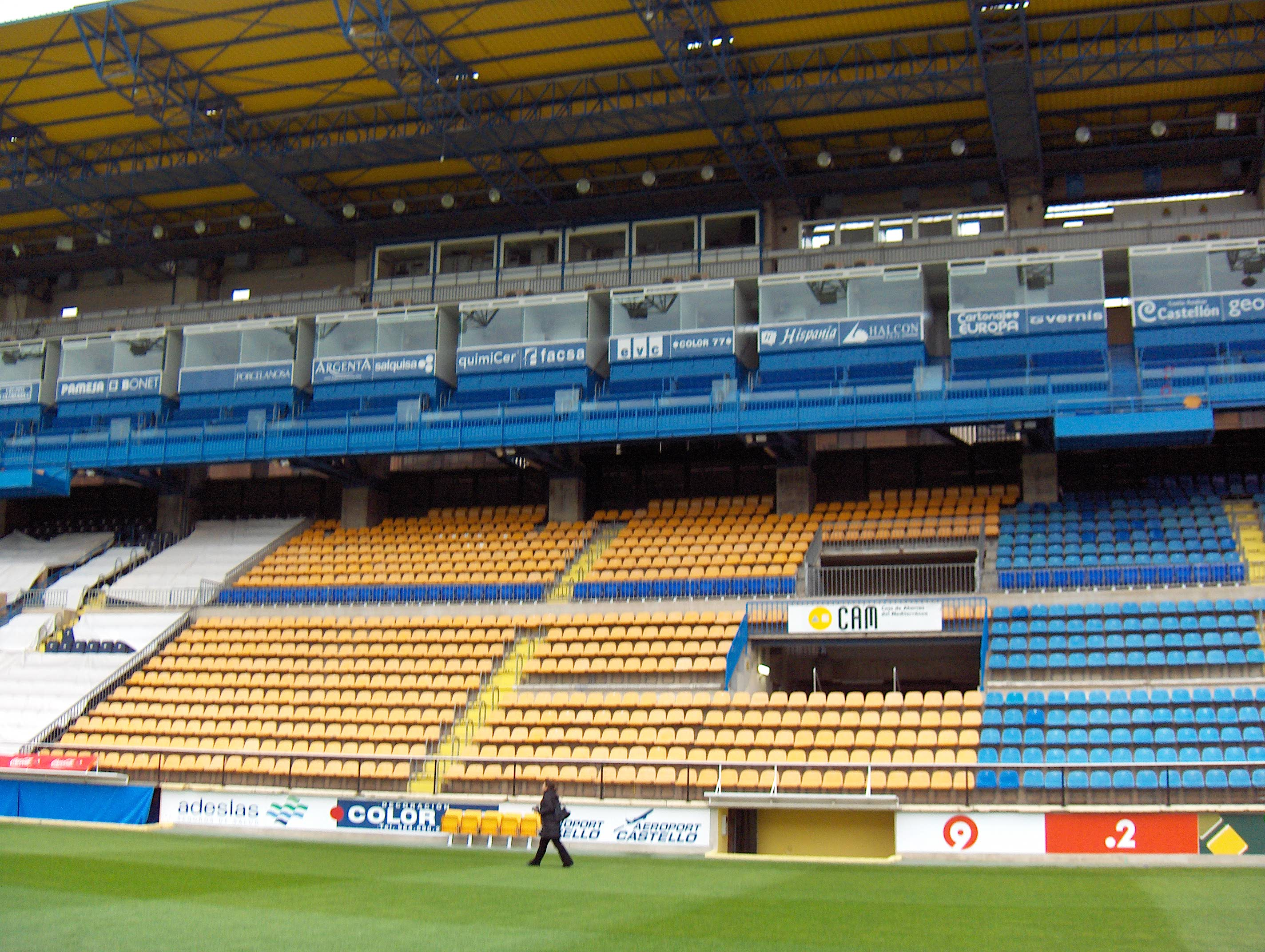 Estadio "El Madrigal", del Villarreal Club de Fútbol